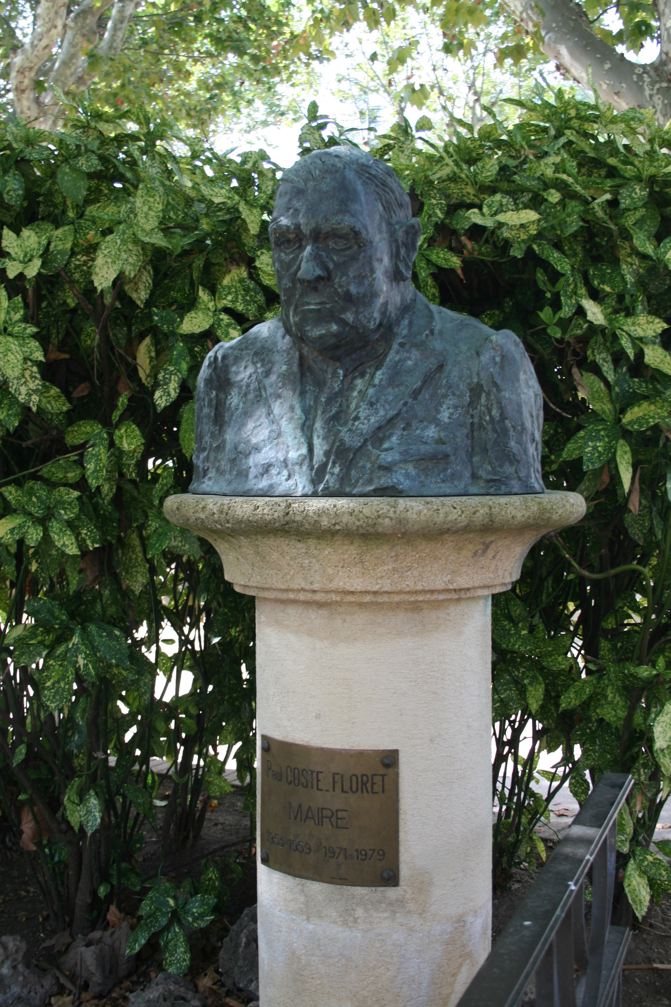 Lamalou-les-Bains - Hérault - buste de Paul Coste-Floret, ancien maire